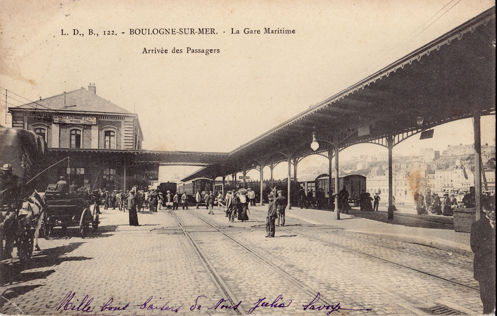 Carte postale ancienne éditée par L. D. à Boulogne, n°122 : BOULOGNE-SUR-MER - La Gare Maritime